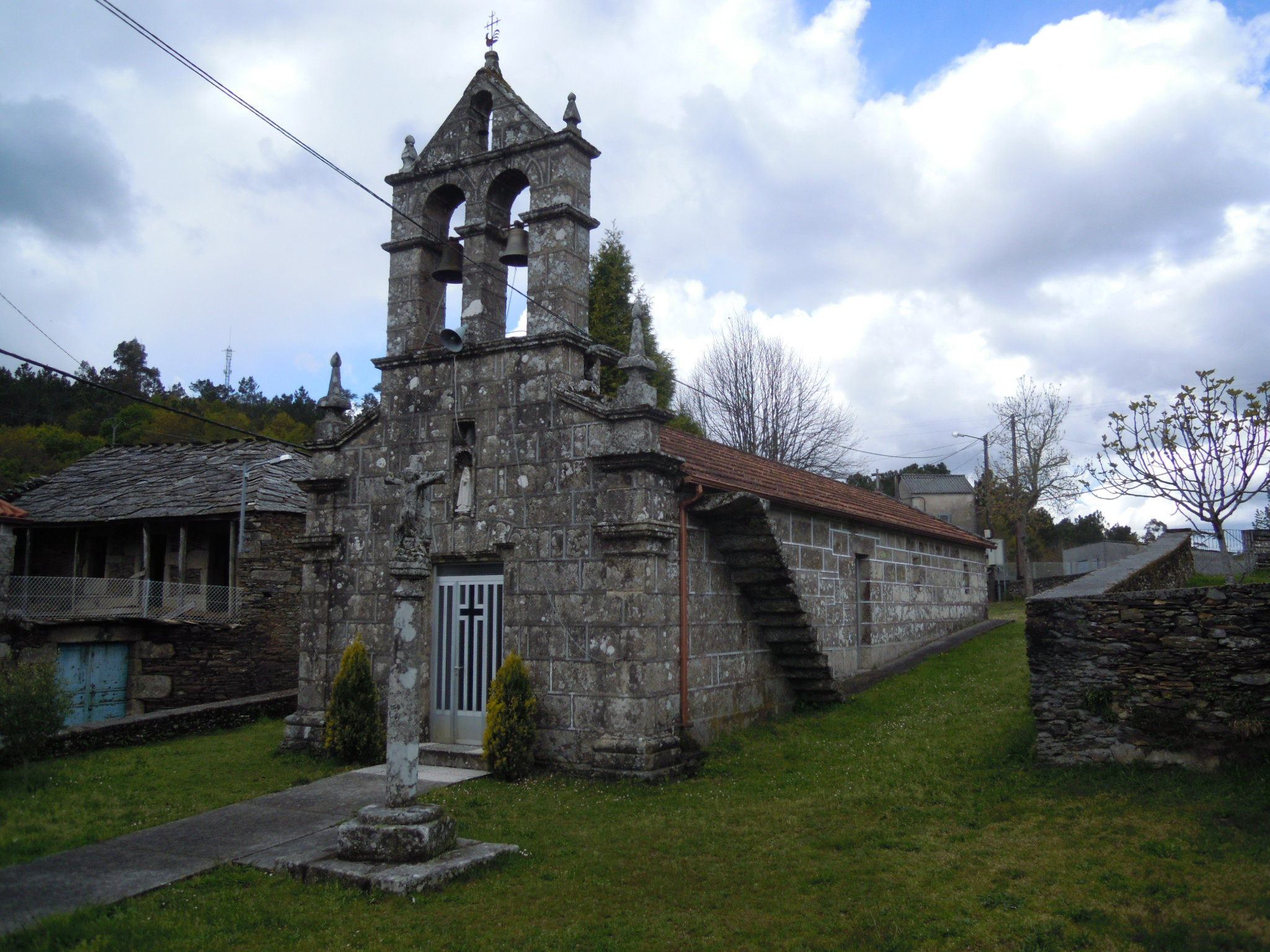 Ermida de Santa Sabela en (Liñares, Baíste, Avión).